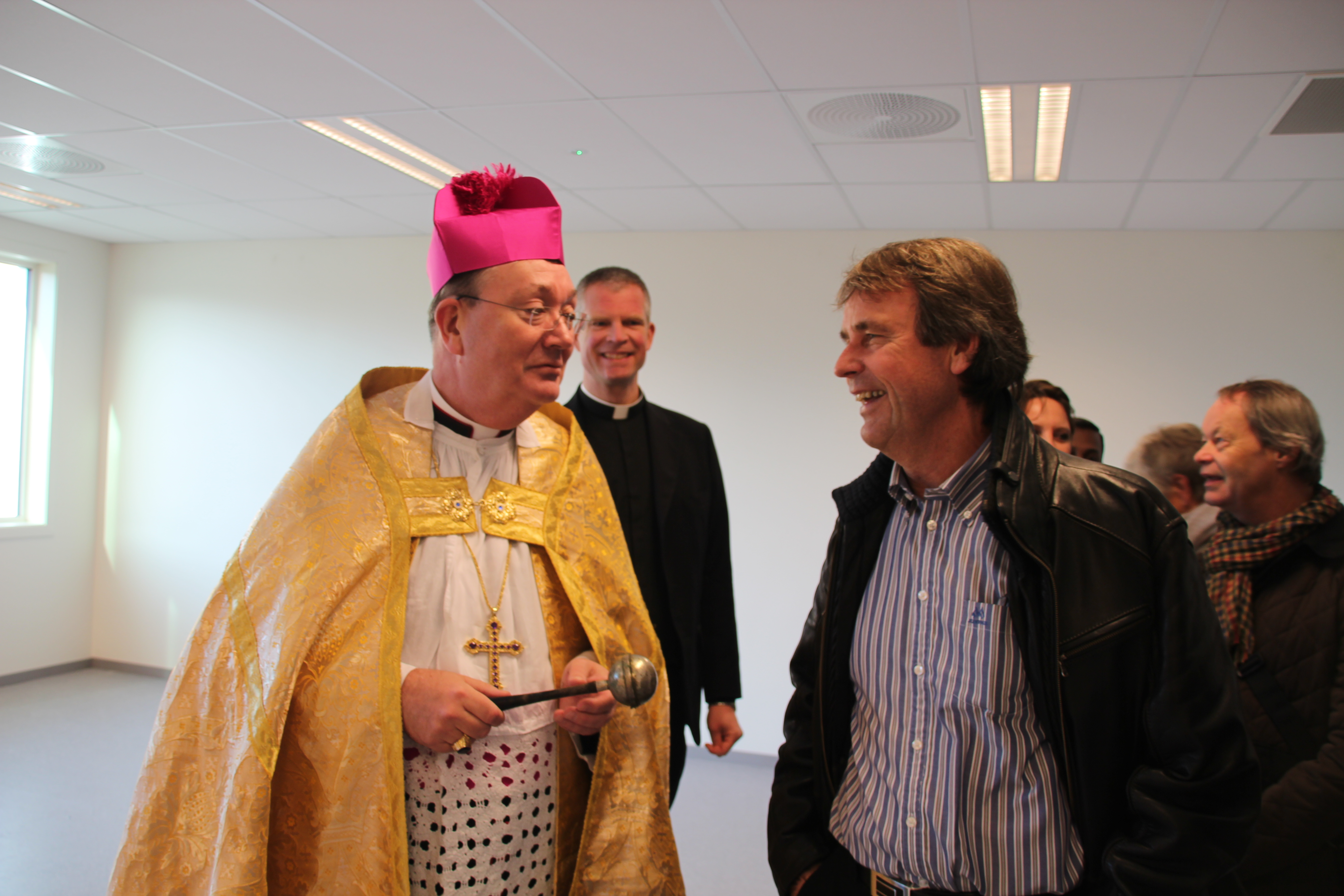 Biskop Bernt I. Eidsvig og arkitekt Kjell Jensen.